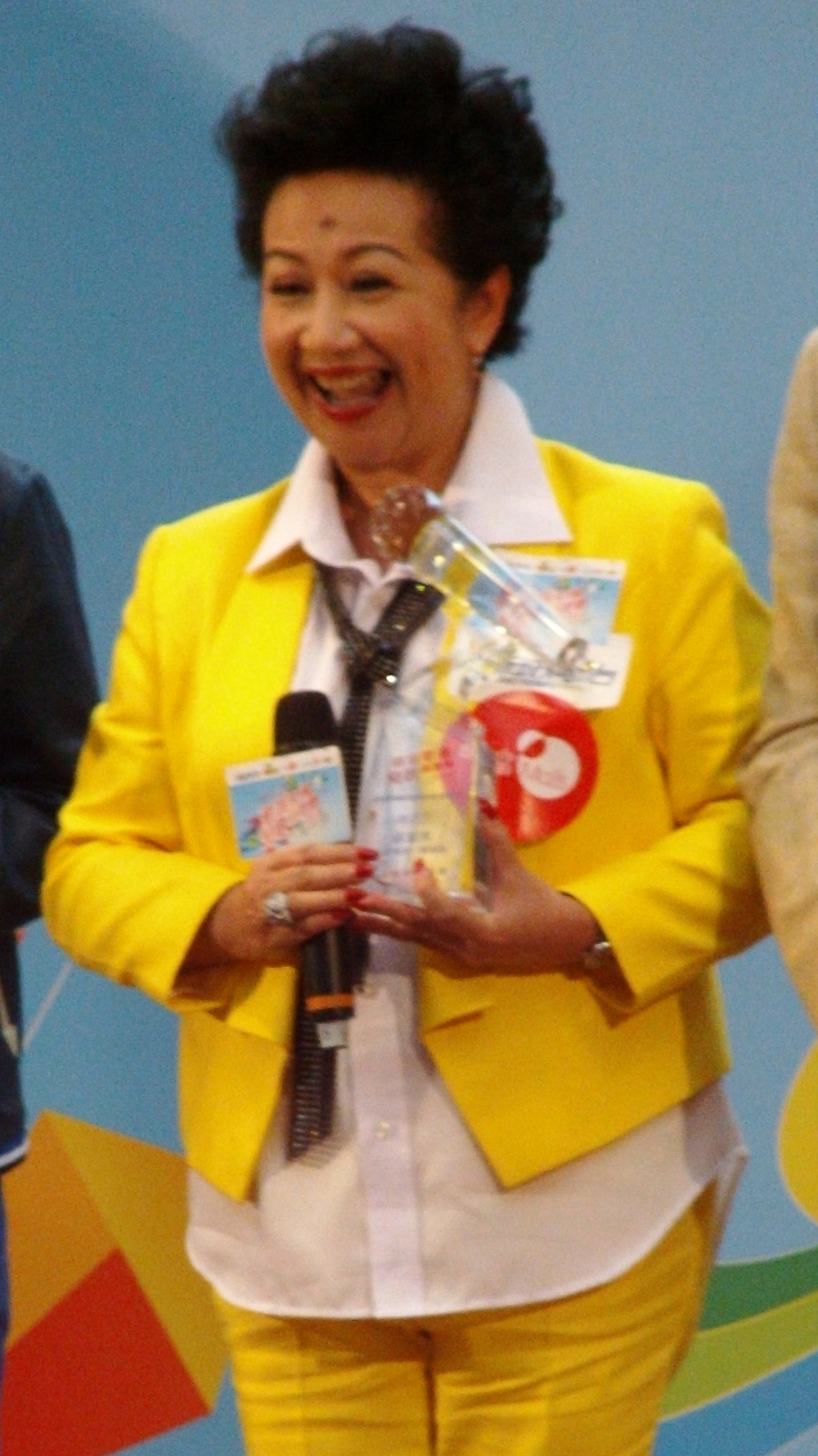 中文（香港）: 薛家燕的樣子